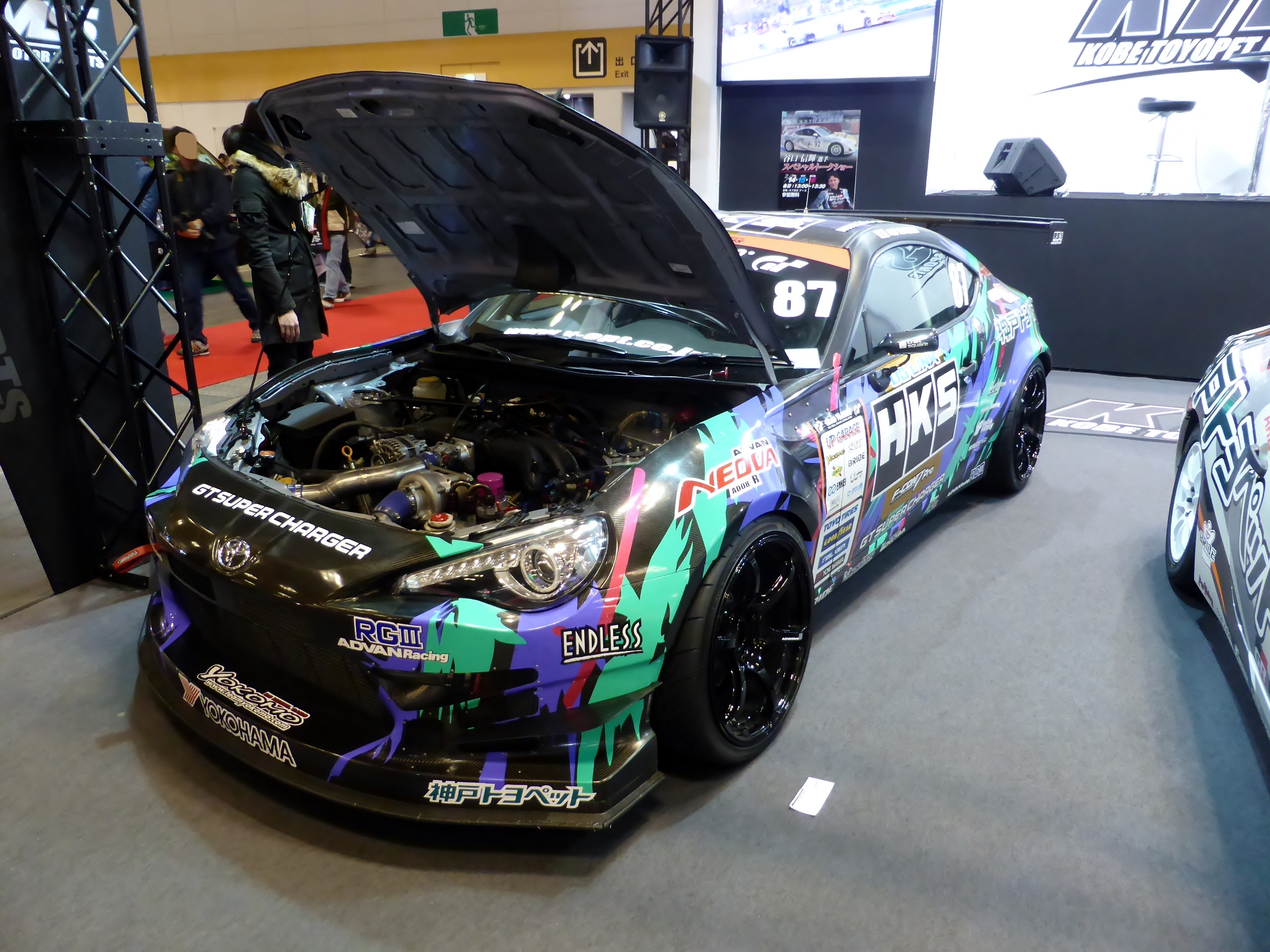 大阪オートメッセ2014においてHKS RACING PERFORMER 86を撮影。